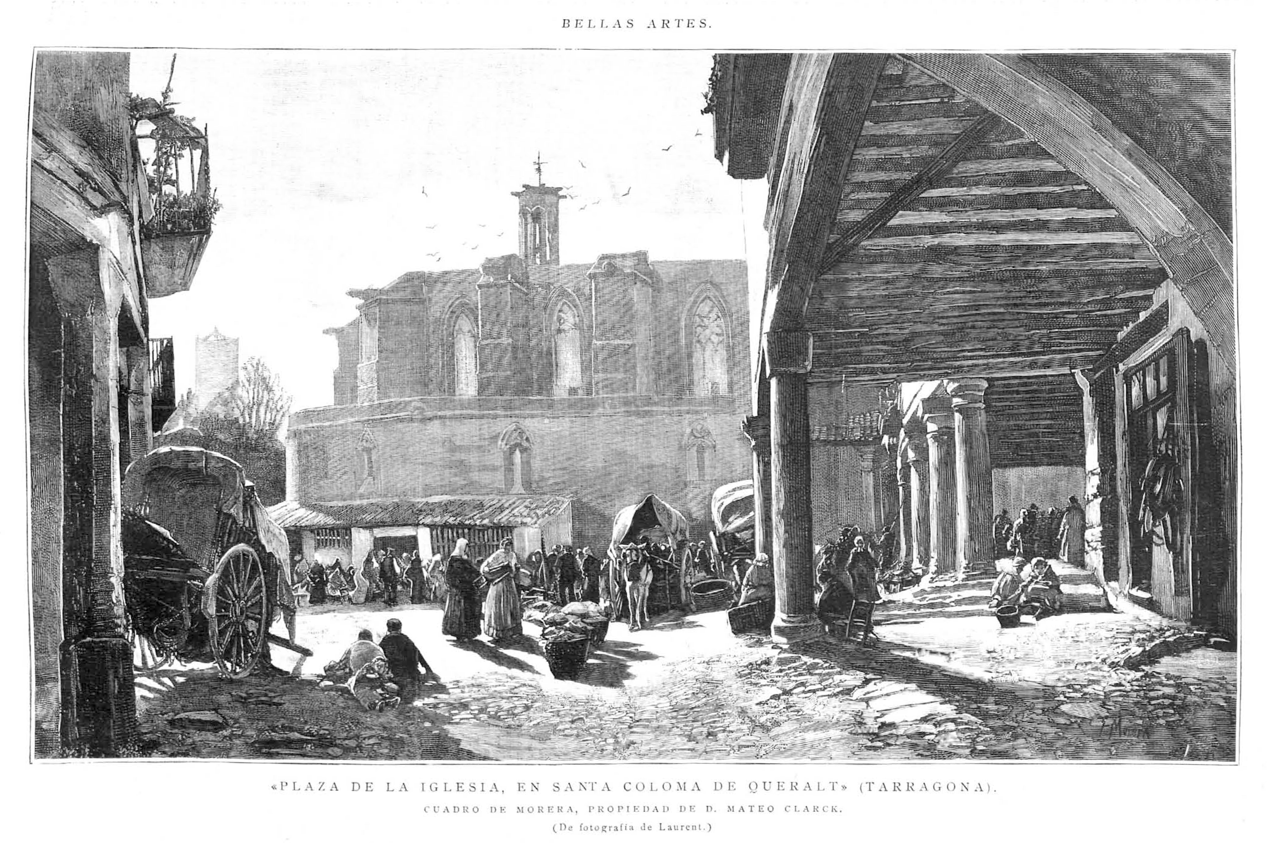 Plaza de la iglesia en Santa Coloma de Queralt (Tarragona).